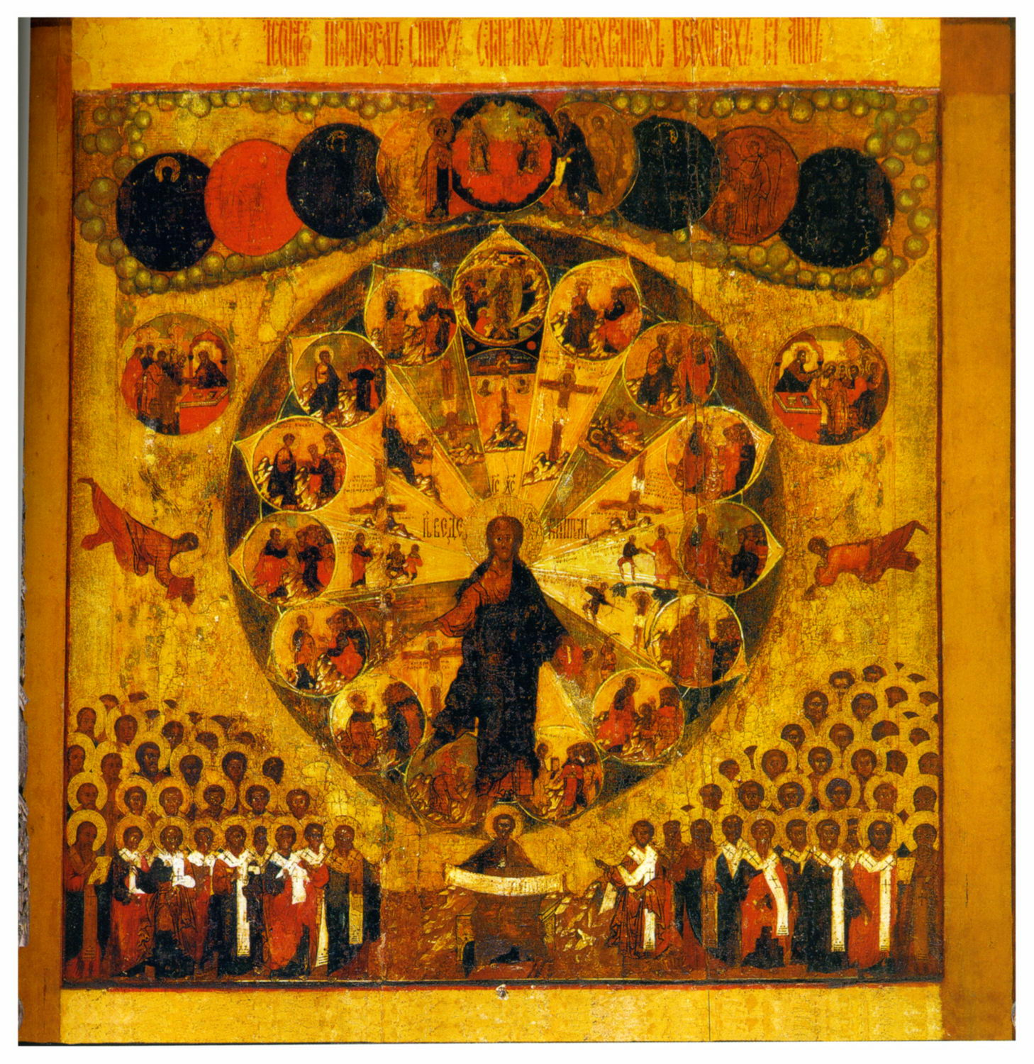 Спас Вседержитель с апостольскими страстями Место хранения: Иконостас придела Трех святителей церкви Воскресения на Дебре в Костроме Реставрация: Реставрирована в Костромской специальной научно-реставрационной производственной мастерской в 1966 году и в 1982-1983 годах. Размер: 92,0 х 93,0 см Материал: Дерево, темпера Персоналии: Спаситель, Богоматерь, ангелы, апостолы Иконографическая справка: Иконографическая схема публикуемого памятника появляется в русском искусстве, по-видимому, на рубеже XVI-XVII веков под балканским влиянием, прежде всего, в монументальной живописи. С середины XVII века, в связи с церковными реформами патриарха Никона, актуализировавшими апостольскую тему в изобразительном искусстве, получает распространение в иконописи. Композиция строится двумя концентрическими кругами. Наружный круг составлен из тринадцати круглых клейм, в которых представлены апостольские проповеди. Внутренний круг составляют тринадцать секторов, где изображены апостольские страдания. В верхнем клейме и секторе представлены события, связанные с Христом. Публикуемый памятник является самой ранней из известных икон данной иконографии. Его отличает простота и традиционность композиционного построения клейм добавляется сцена побиения камнями архидиакона Стефана и стирается граница между изображениями проповедей и мучений. Особенность костромской иконы — изображение в круглом клейме наружного круга сюжетов над Христом композиции «Сошествие во ад», а не Распятия, которое закрепилось на этом месте в других памятниках данной иконографии. Распятие изображено ниже, в секторе, входящем в круг апостольских страстей.